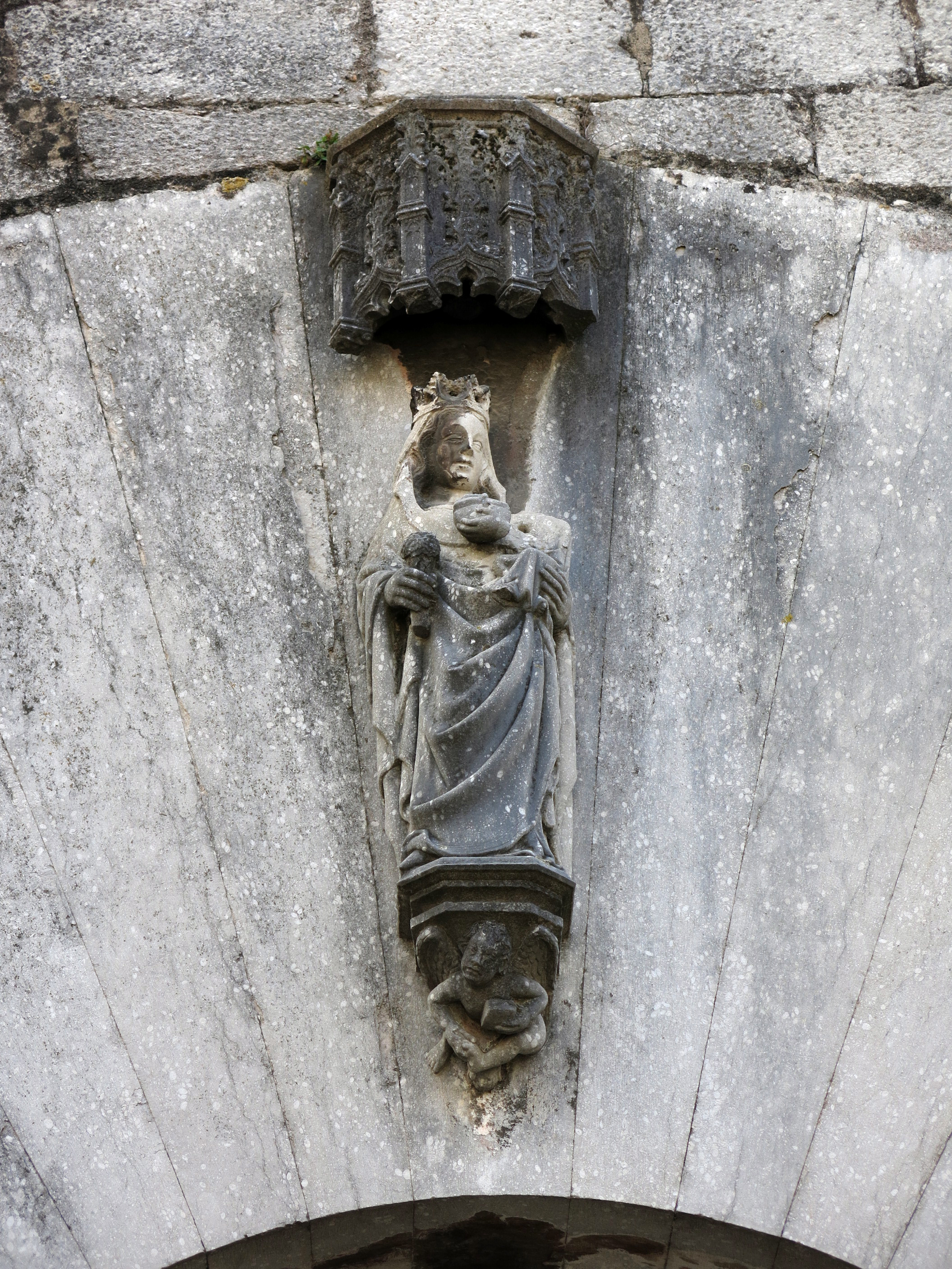 La Pia Almoina (Girona)